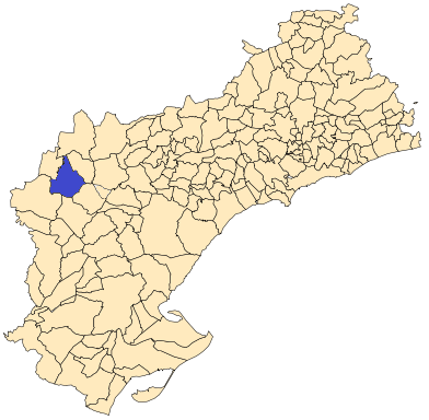 Situación de Vilalba dels Arcs en la provincia de Tarragona.